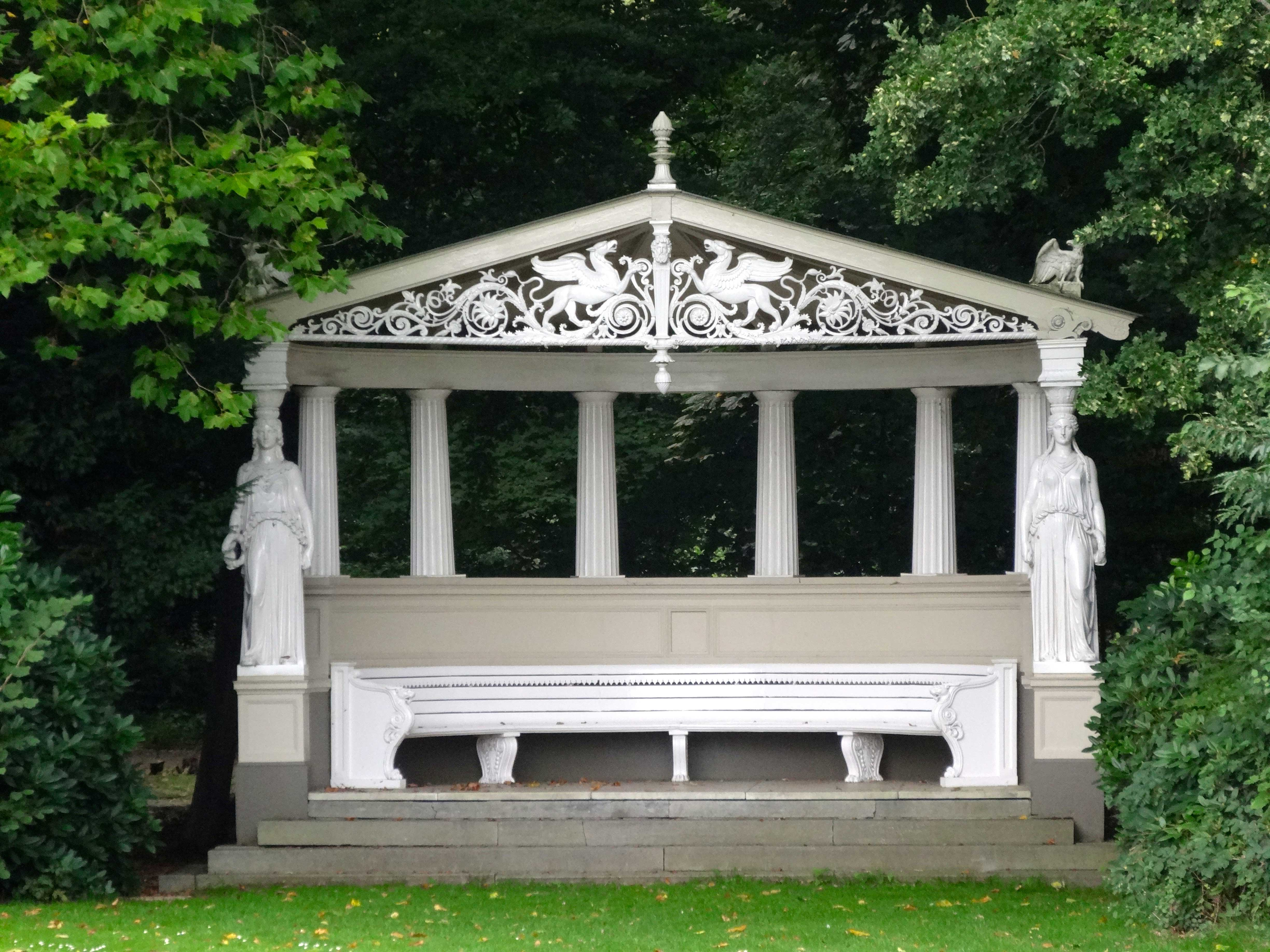 Tuinbank bij 't Laer nabij Ommen